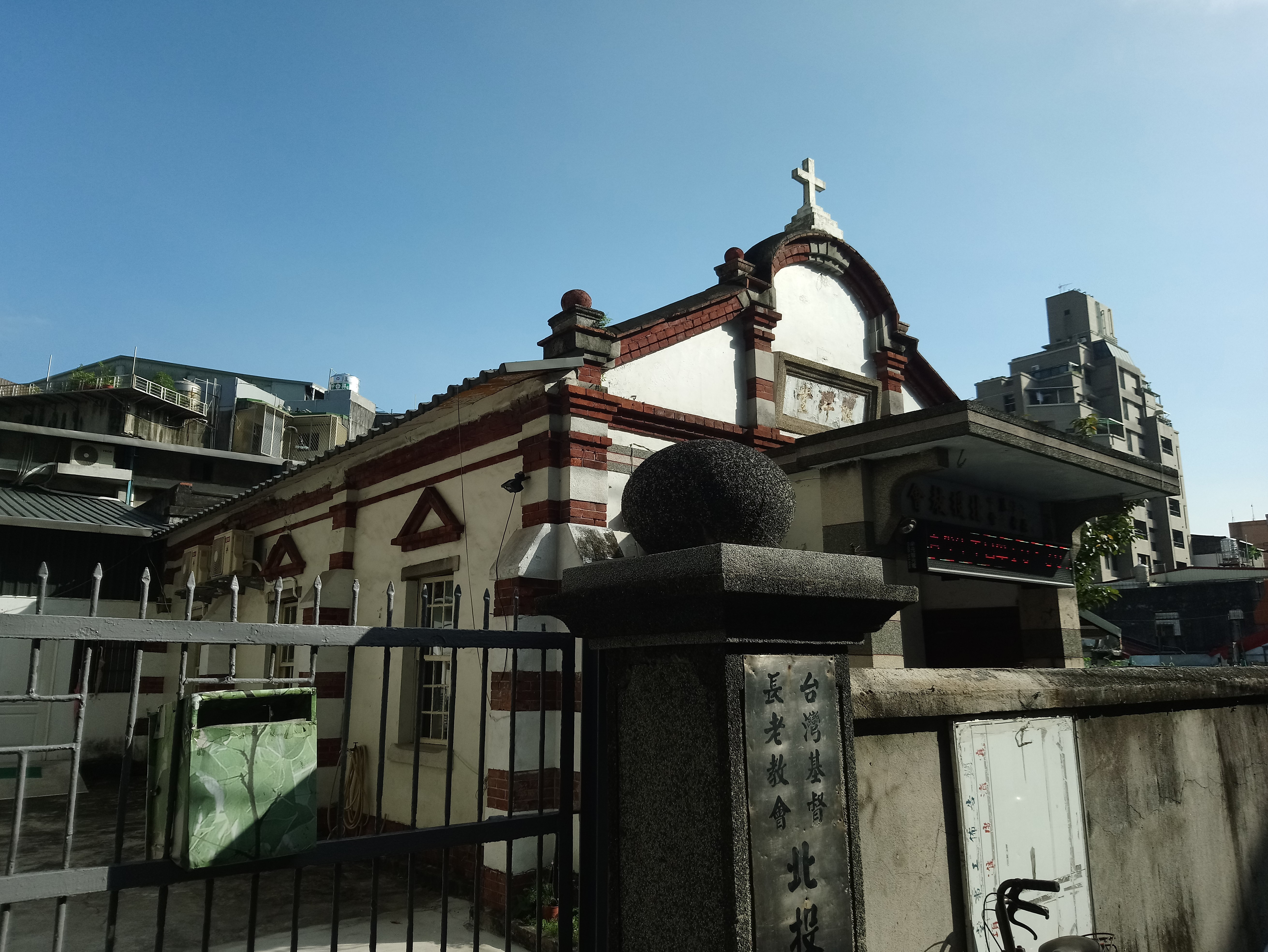 長老教會北投教堂,臺北市北投區舊北投次分區清江里